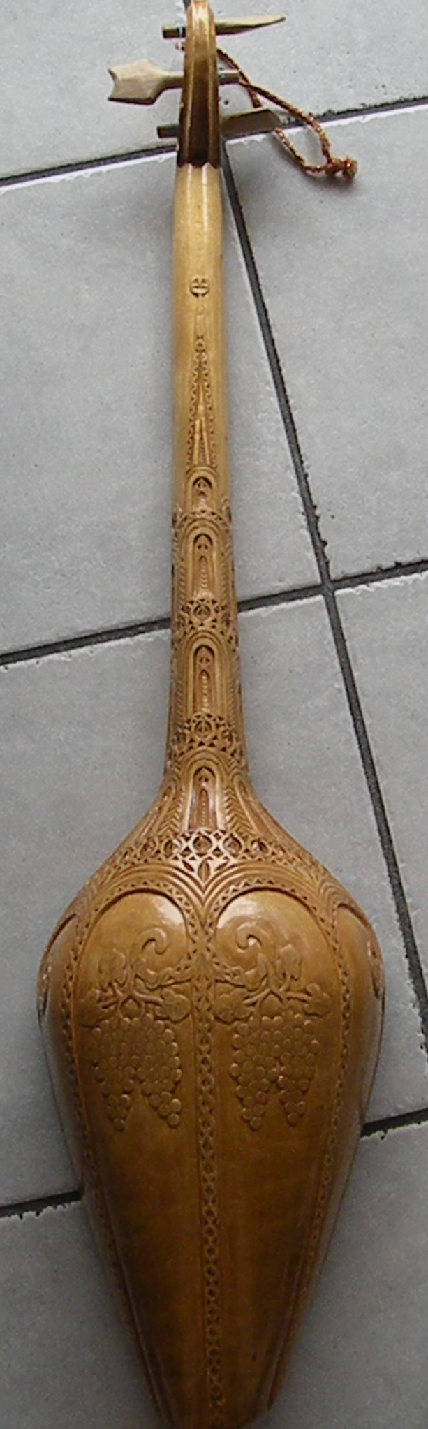 panduri de dos